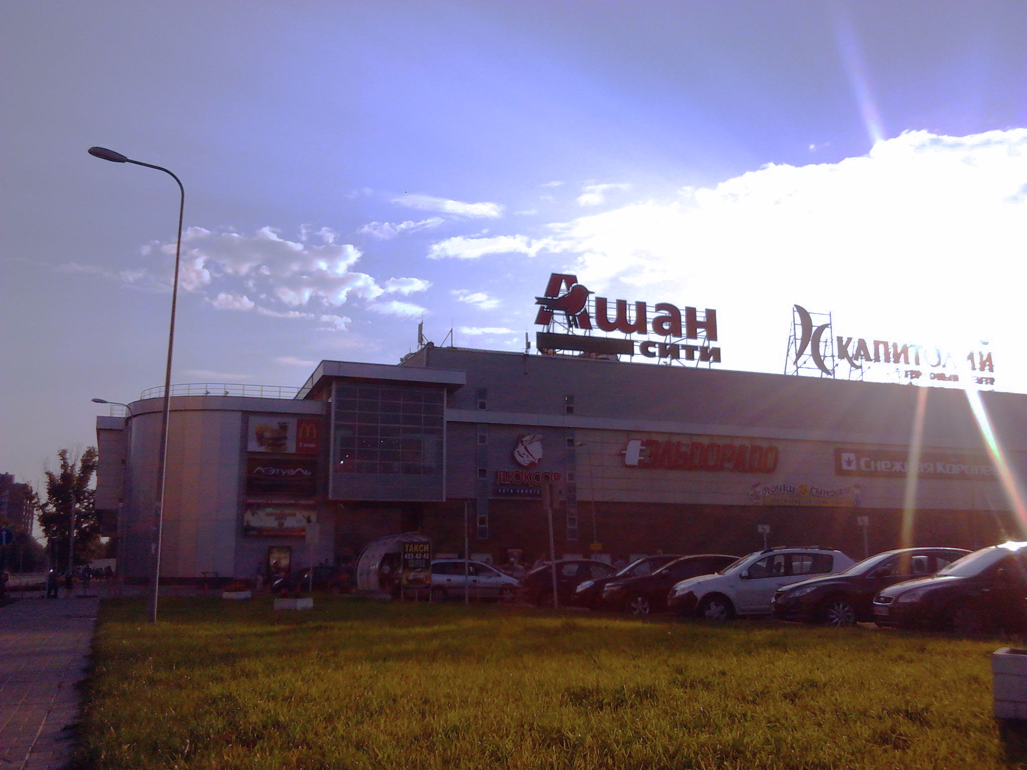 ТЦ "Капитолий" г. Орехово-Зуево, август 2013